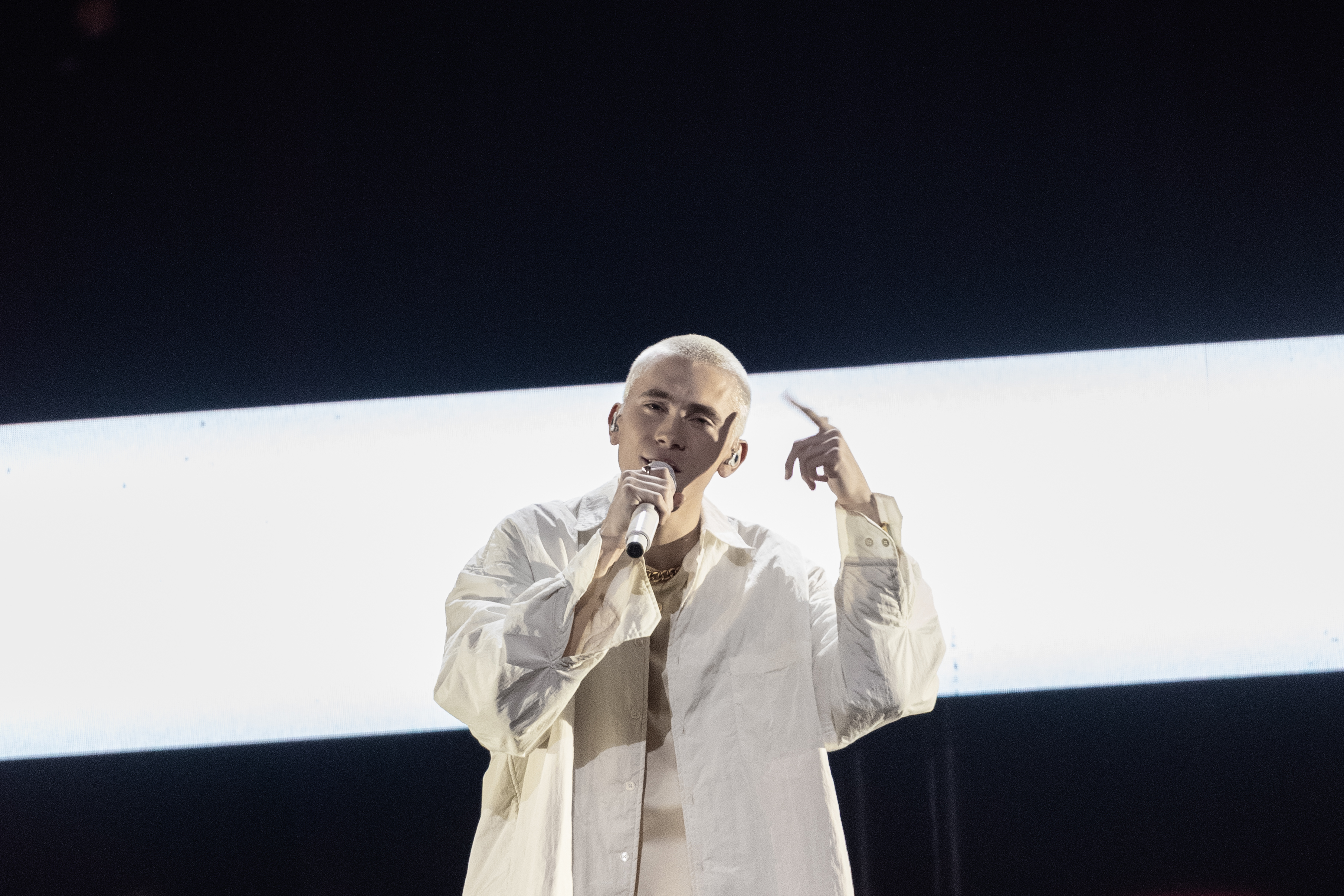 Felix Sandman sjunger sitt bidrag "Boys with emotions" i finalen i Melodifestivalen 2020.